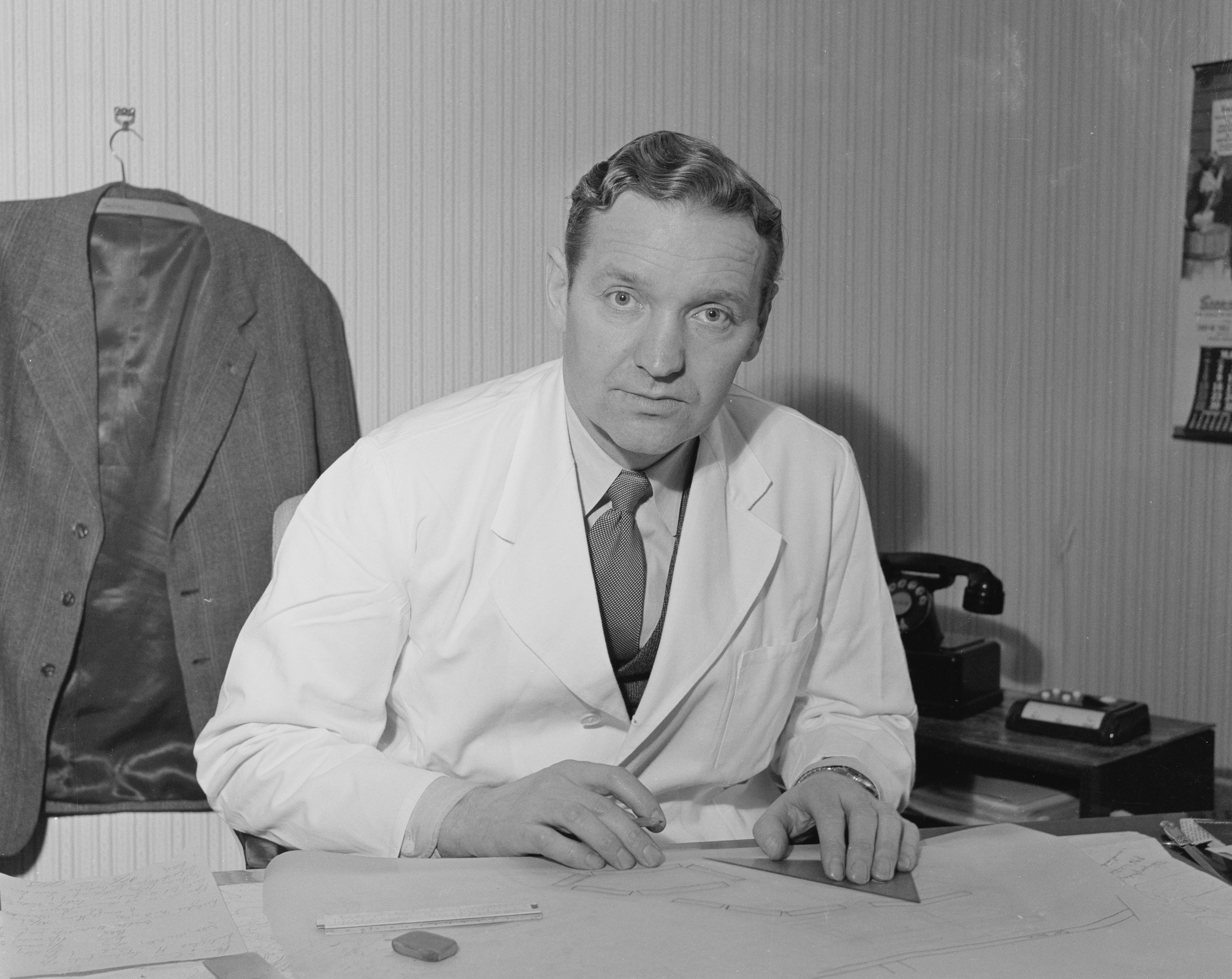 Bildet er hentet fra Arkivverket. Sivilingeniør og bygningsentrepenør Olav Selvaag. Han er kjent for å ha forenklet byggemetodene og ha bygd et stort antall rasjonelle og rimelige boliger, særlig i Oslo. NÅ nr. 6, 1953 Arkivinstitusjon : Riksarkivet Arkivnavn : Billedbladet NÅ Sted : Norge, Ukjent, Ukjent, Ukjent Emneord: Portretter, Menn, Boligbygging, Sivilingeniører Avbildet: Selvaag, Olav